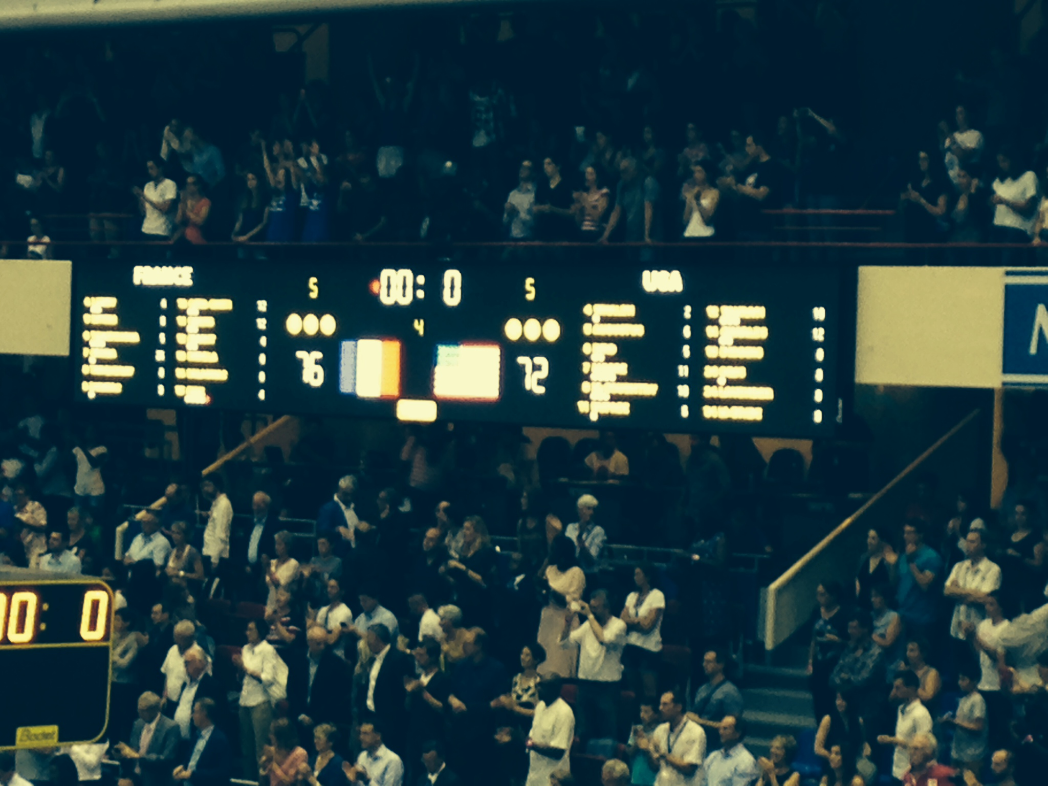 Le tableau de marque de la rencontre France USA le 21 septembre 2014 à Paris